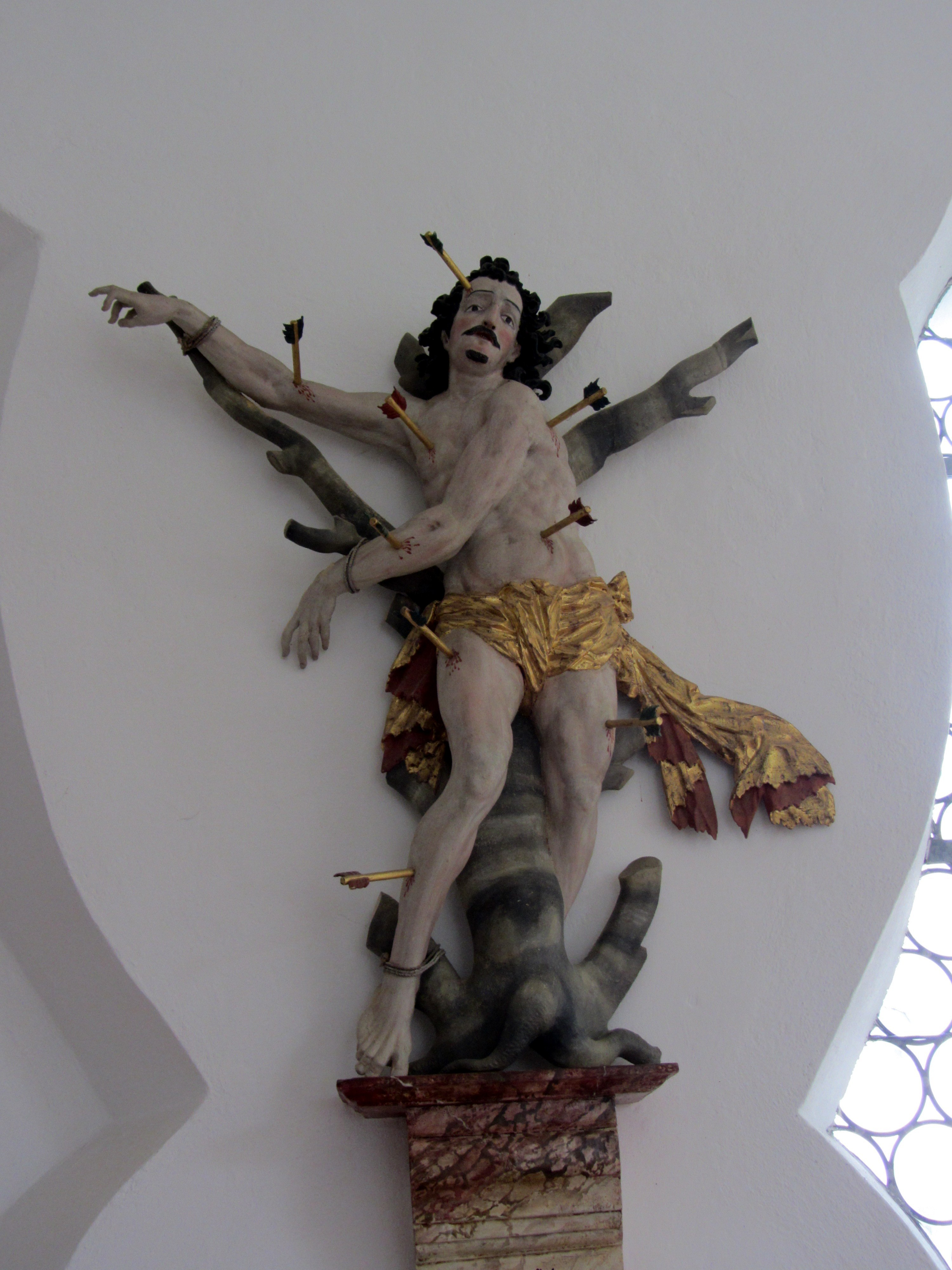 Dorfkapelle Adelshofen - Heiliger Sebastian